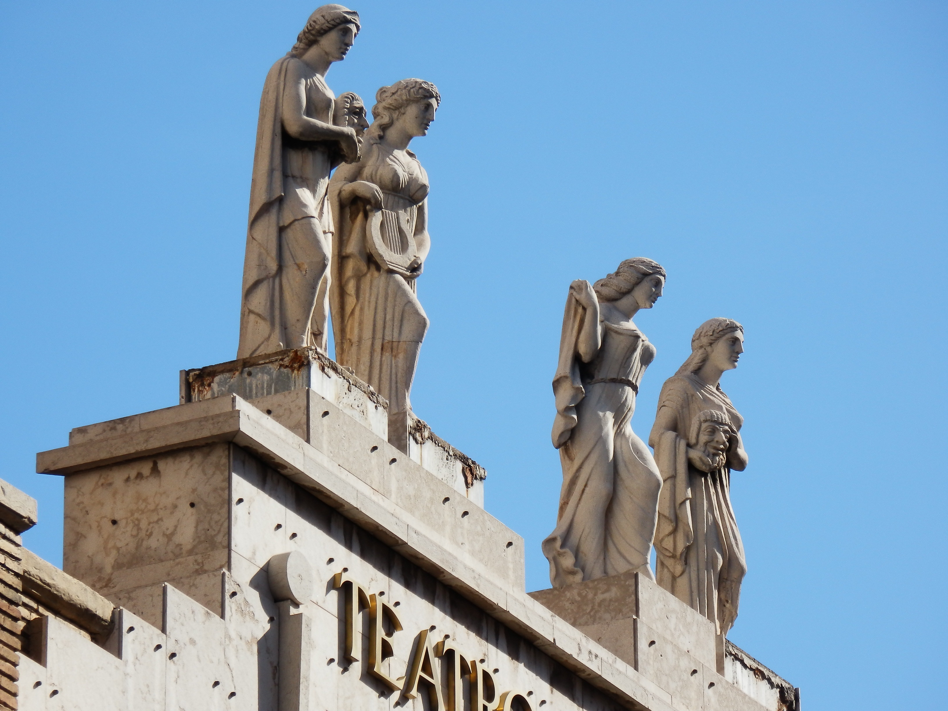 Musas del teatro: Melpómene, Thalia, Euterpe y Terpsícore, (1969-1970) en el Teatro Principal de Zaragoza. Obras de Francisco Rallo Lahoz.